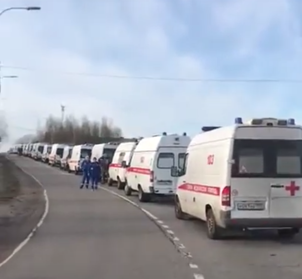 Пробка из машин скорой медицинской помощи в Химках во время пандемии COVID-19 в Федеральный клинический центр высоких медицинских технологий ФМБА